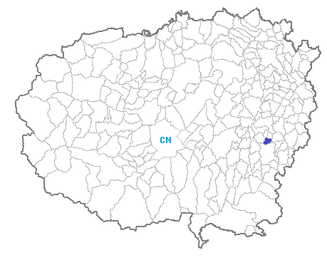 Posizione del comune nella provincia di Cuneo